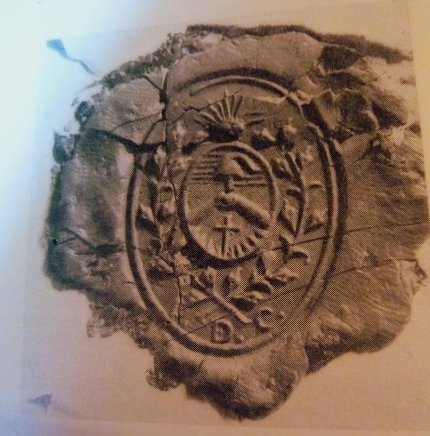 Primer Gran Sello de Corrientes - 1818